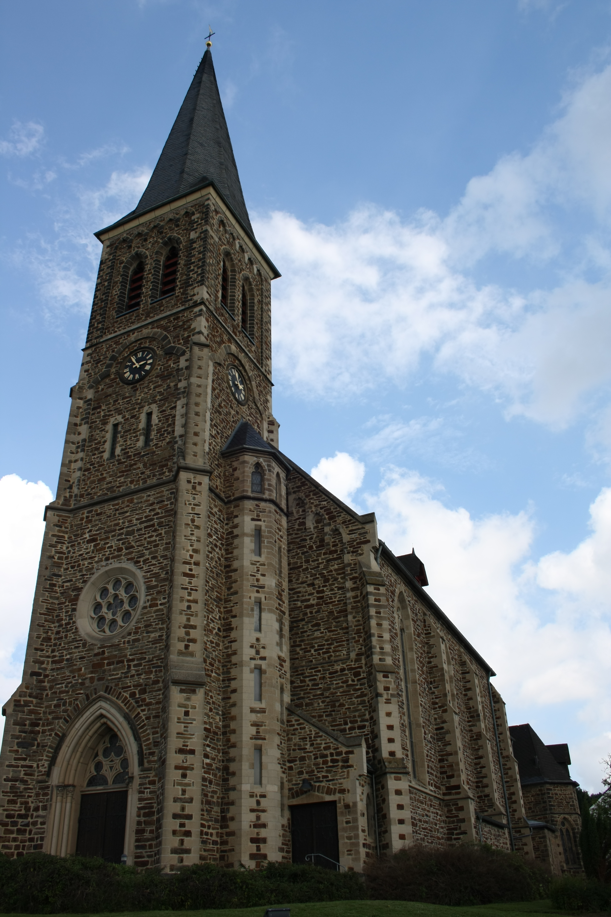 Katholische Pfarrkirche St. Martin in Holzweiler (Gemeinde Grafschaft), erbaut 1898, Architekt: Ludwig von Fisenne